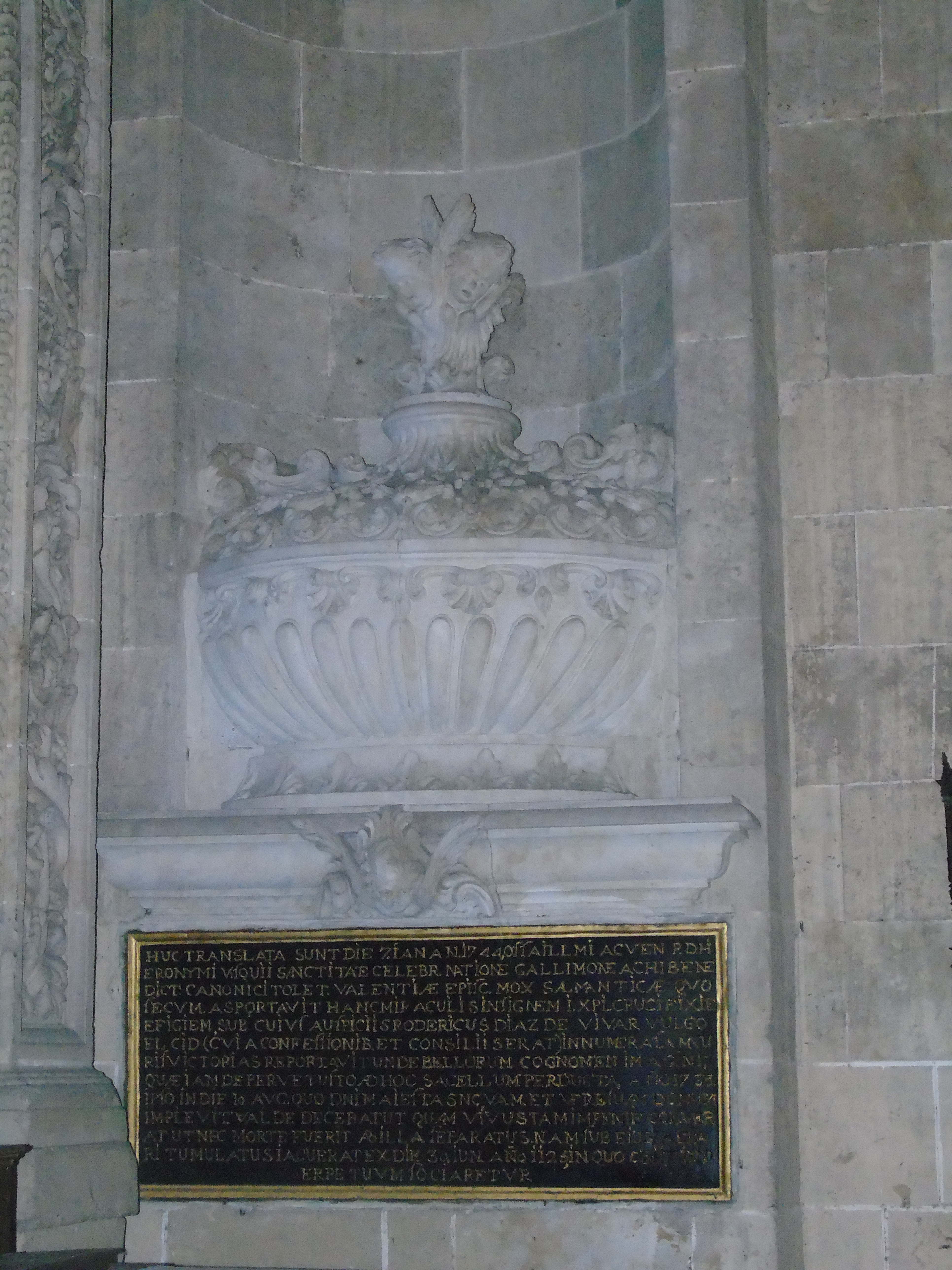 Sepulcro de don Jerónimo de Perigord en la Capilla del Cristo de las Batallas